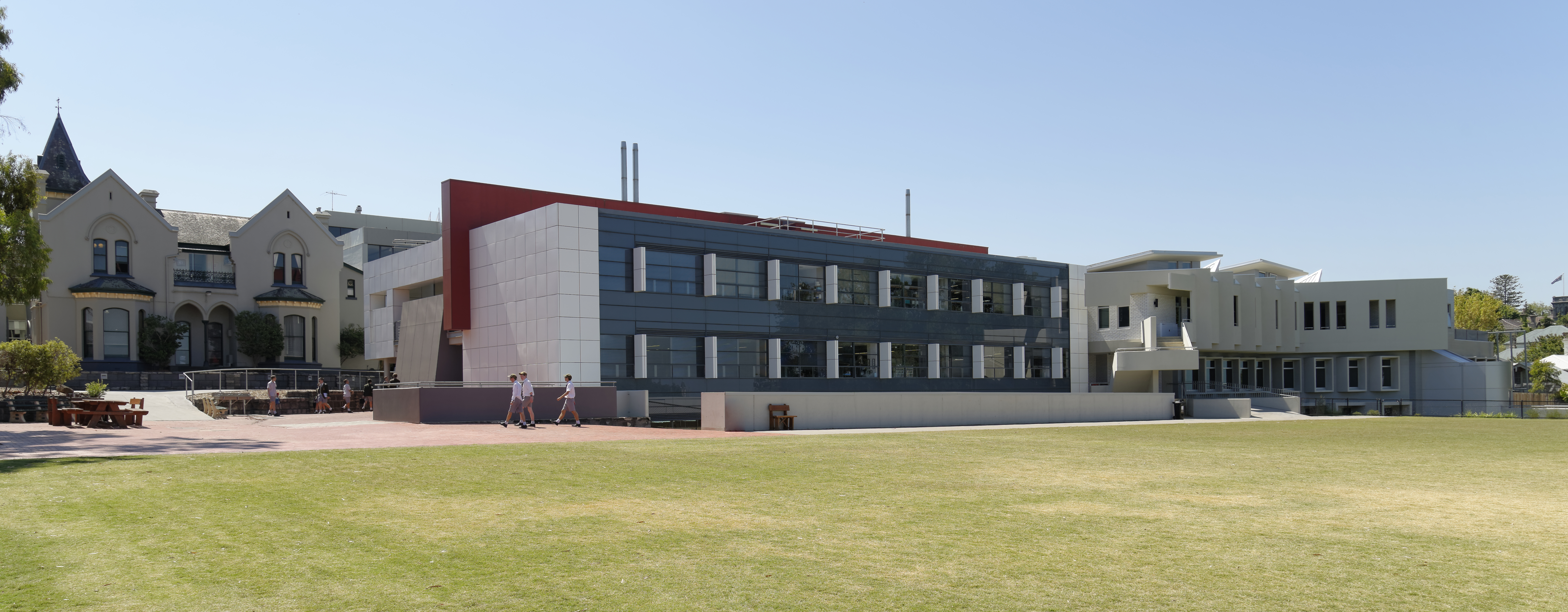 从操场上看三一文法学校